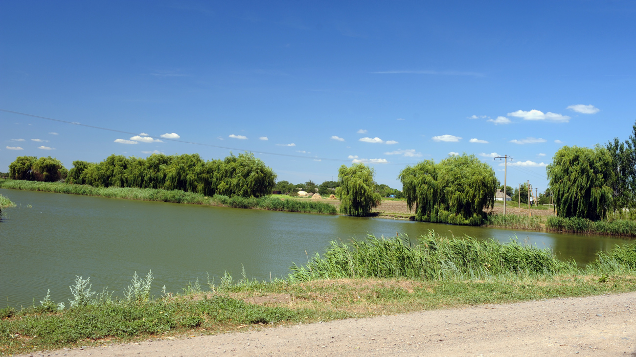 Першопокровская вода